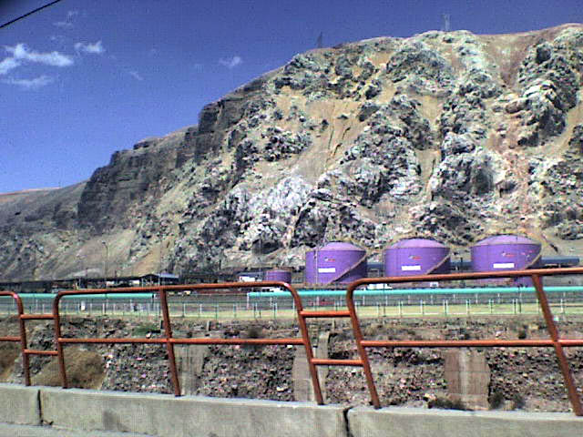 La Oroya, Peru